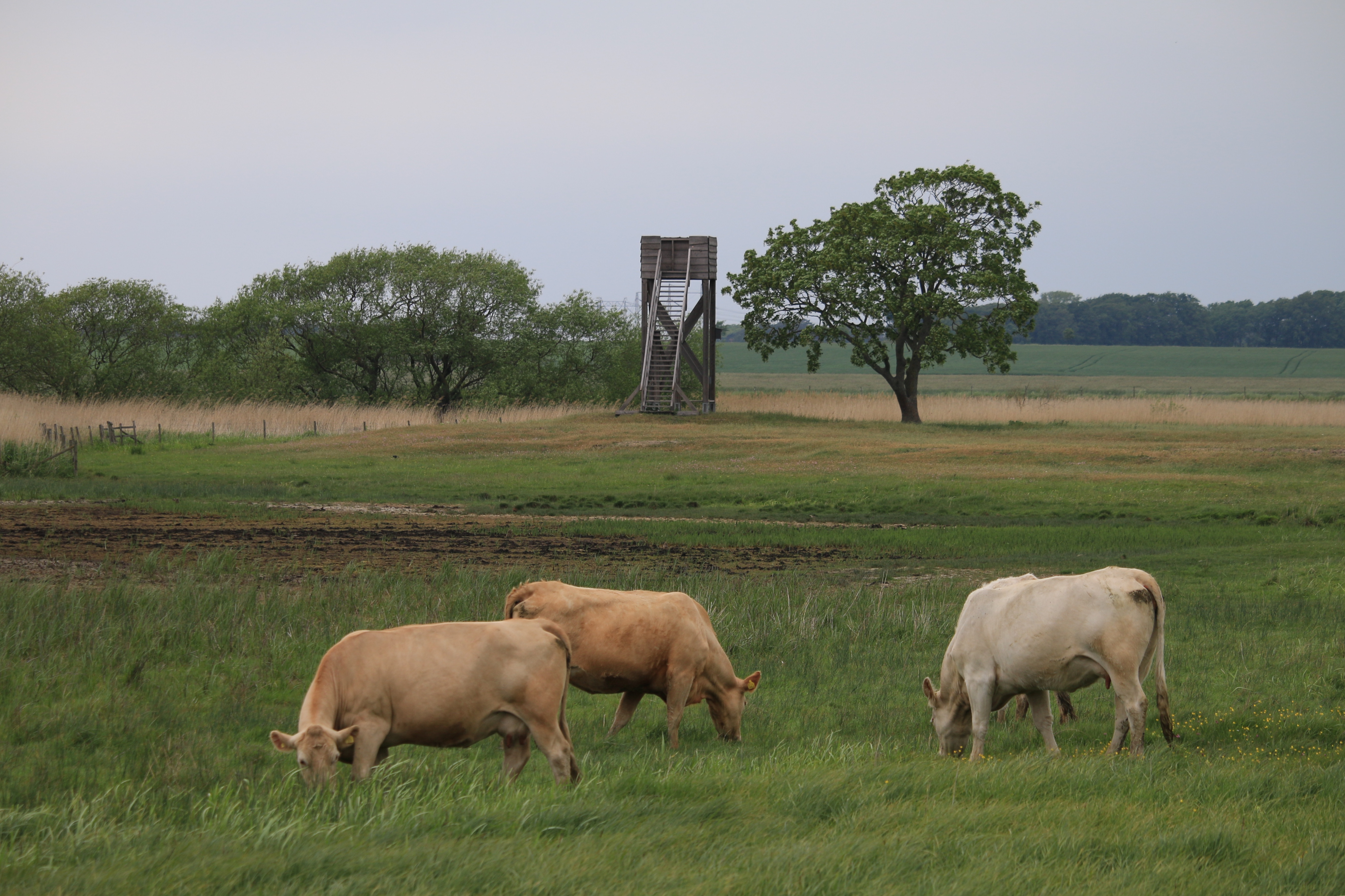 Löddeås mynning, södra delen, naturreservat